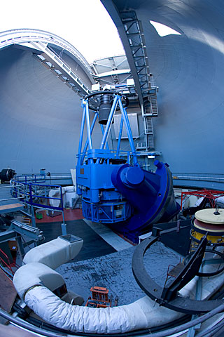 Teleskop ESO 3,6m